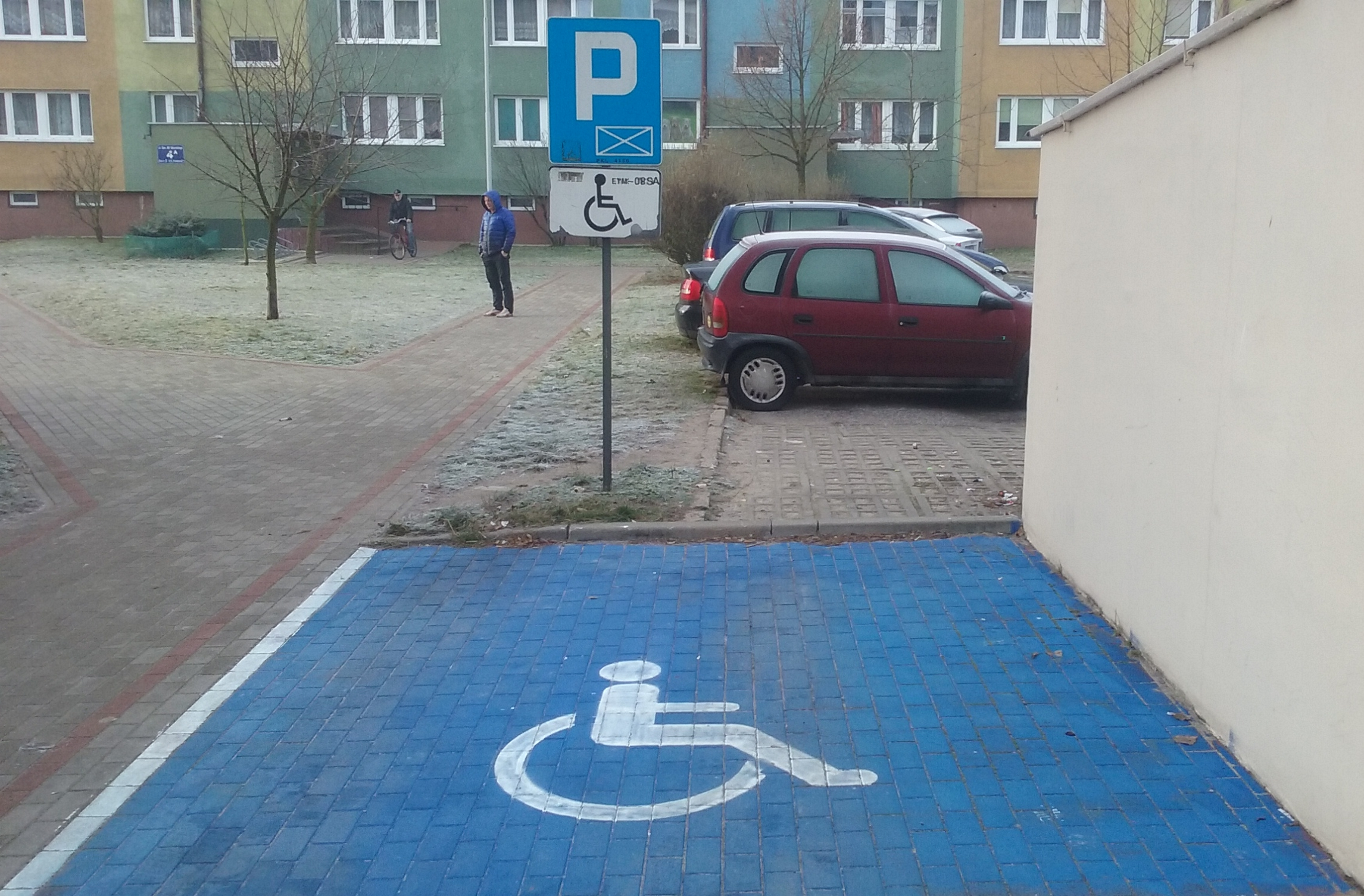 Miejsce parkingowe zarezerwowane dla osób niepełnosprawnych na parkingu osiedlowym w Tomaszowie Mazowieckim, grudzień 2018